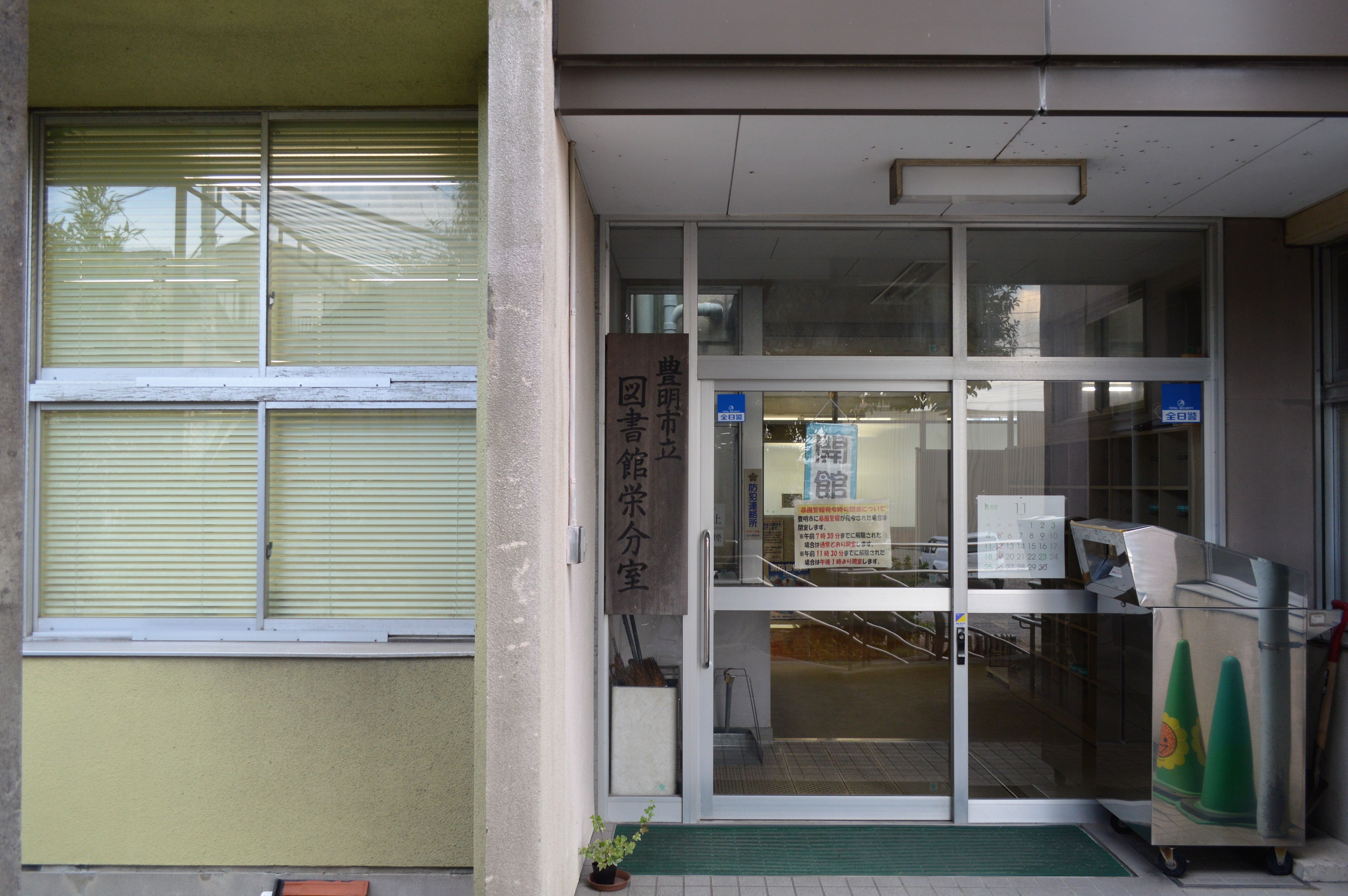 愛知県豊明市にある豊明市立図書館栄分室の入口。豊明市立栄小学校の空き教室を用いている。